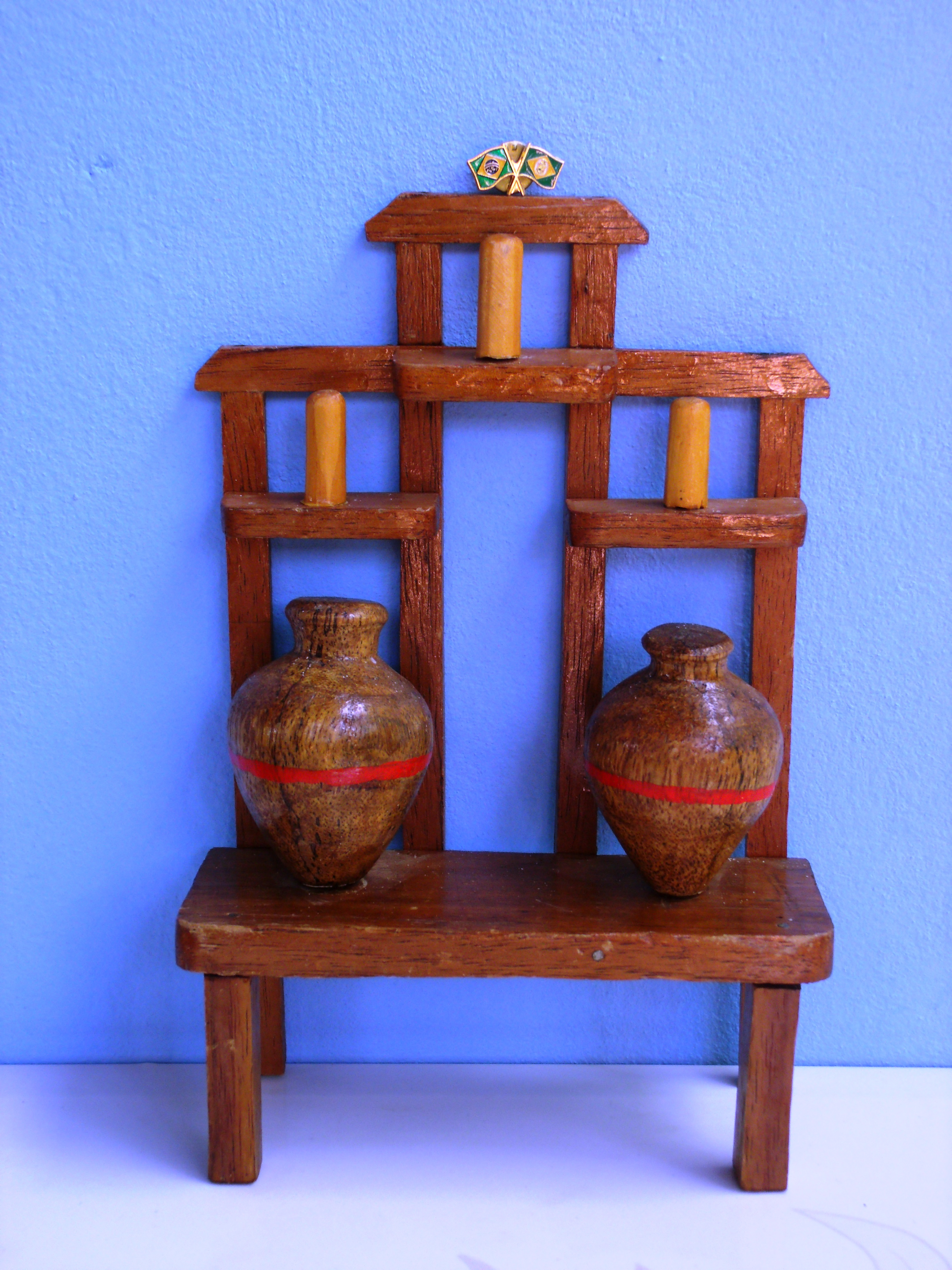 Arte artesanal com coco de babaçu feita em no Mercado Público de Altos no Piauí